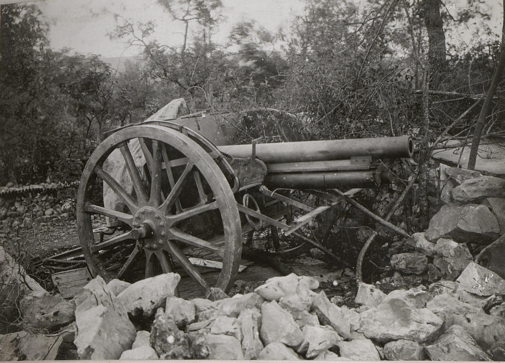 Feldgeschütz in Stellung a.d. Isonzofront.6.9.17.